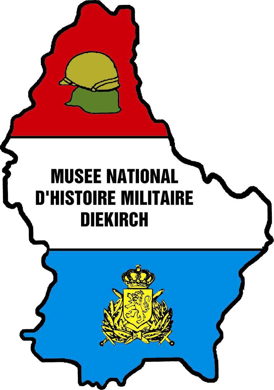 Logo Musée